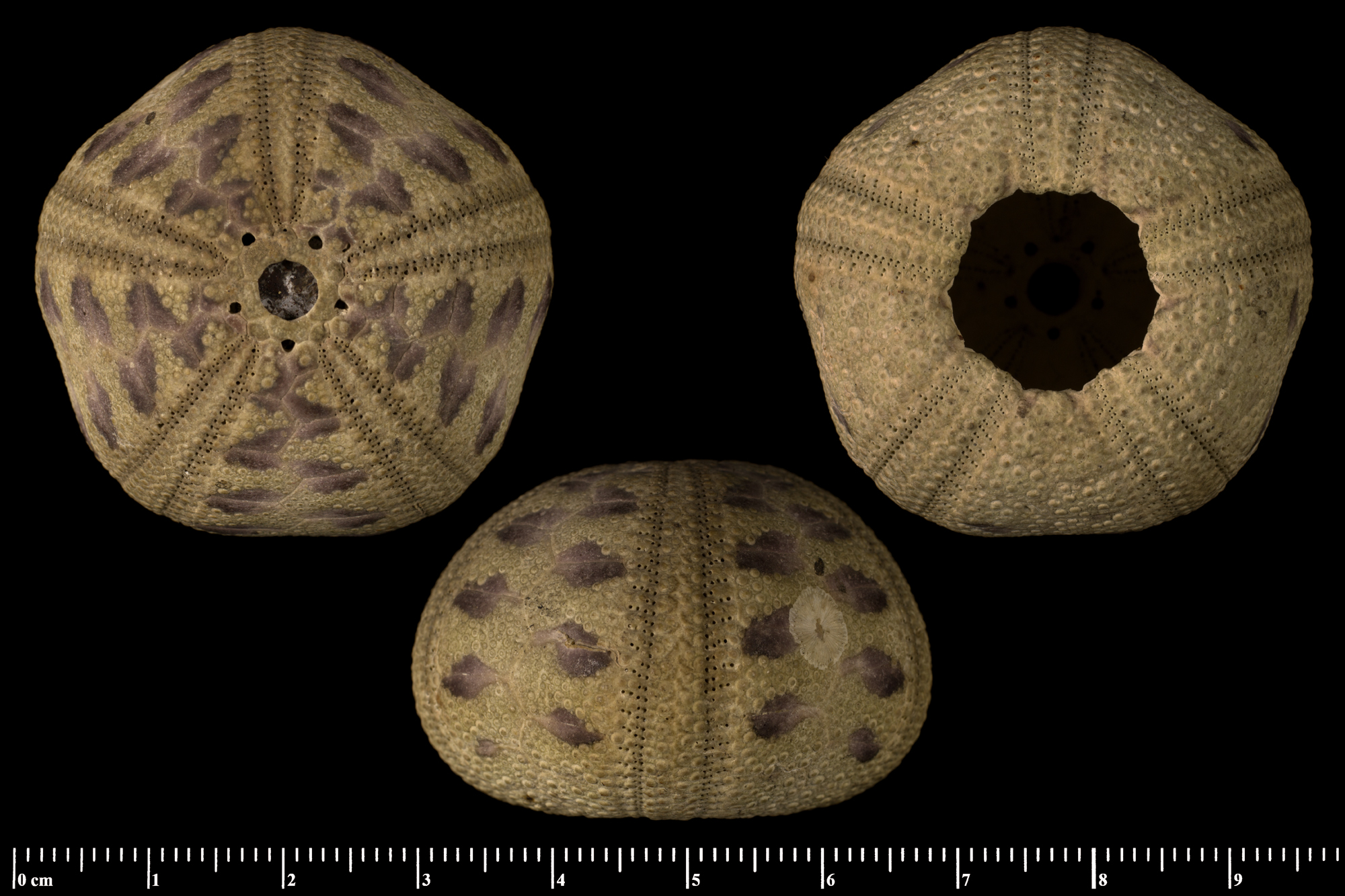 Microcyphus rousseauiSpécimen fossile MNHN.F.J00889Collection : Paléontologie (F)Muséum National d'Histoire Naturelle (Paris, France) Origine : Libellé du pays : Japon Commune : Localité inconnue Datation : Ère : Actuel